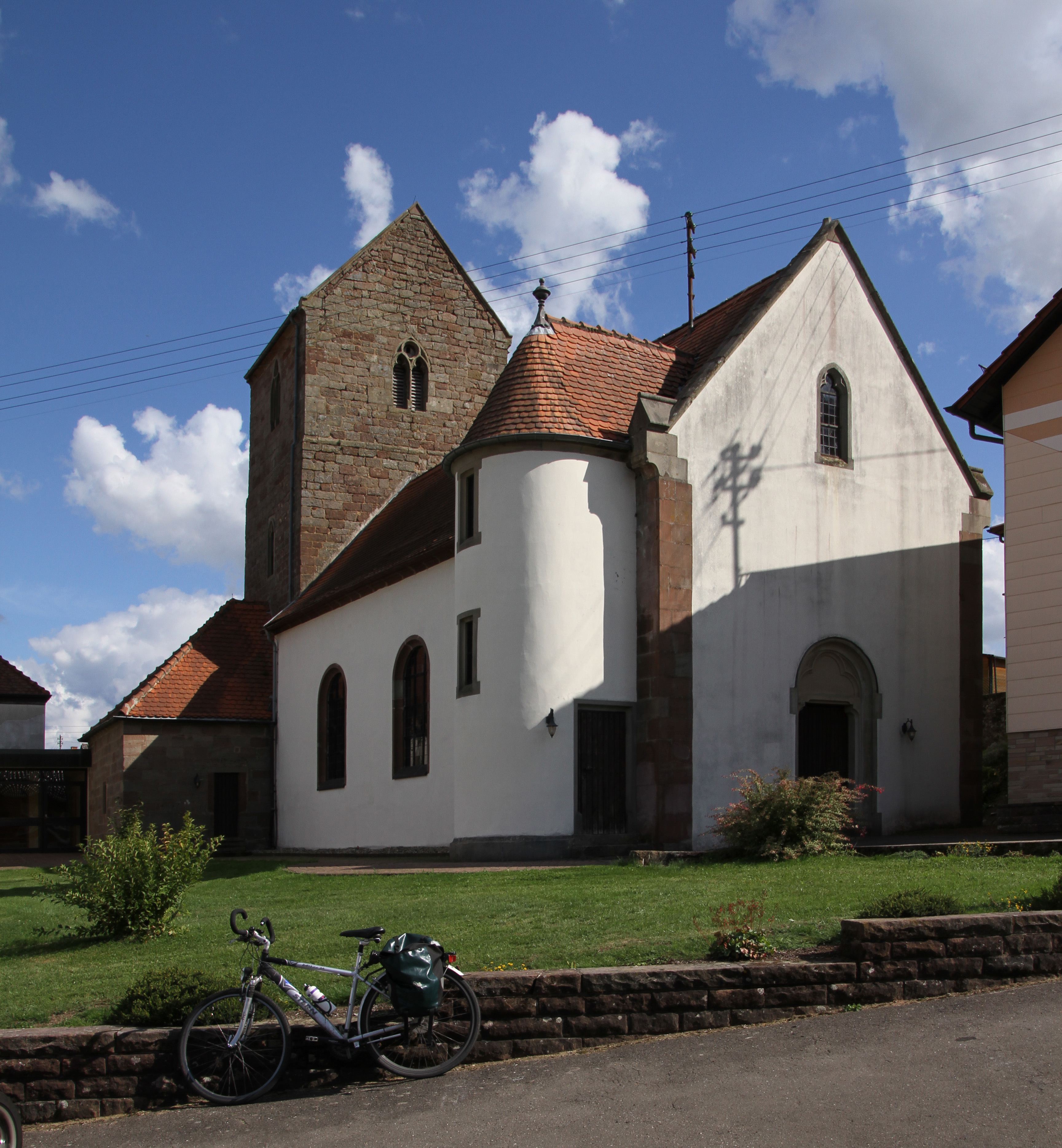 Maßweiler, Rosenhofstraße 5; evangelische Pfarrkirche; romanischer Turmbau um 1200, frühgotischer Umbau des Turms, spätgotische Sakristei, Schiff 1785/86, neugotische Giebelfront und Treppenturm, 1896.